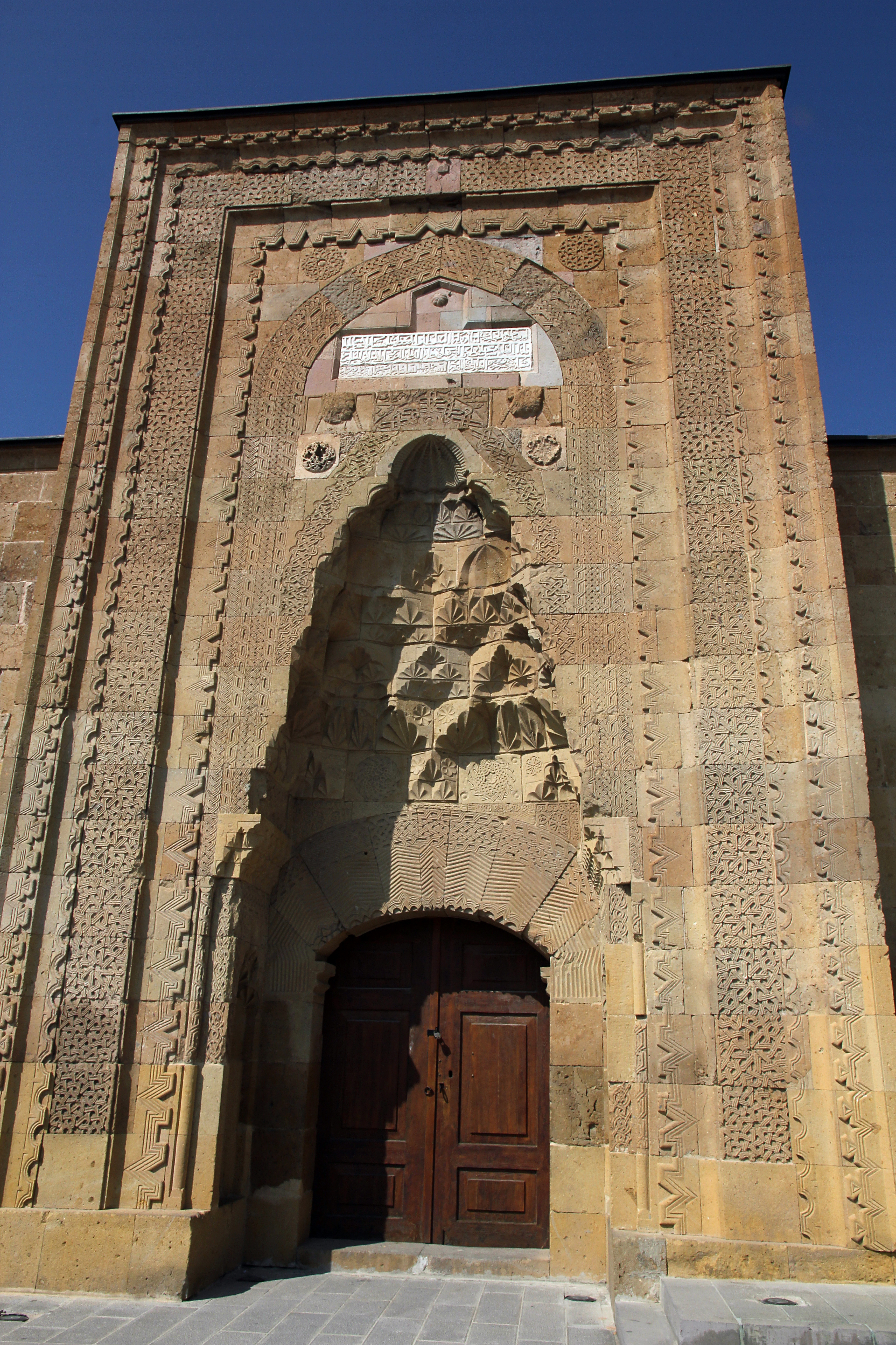 Portal der Alaaddin-Moschee auf der Festung von Niğde, Türkei